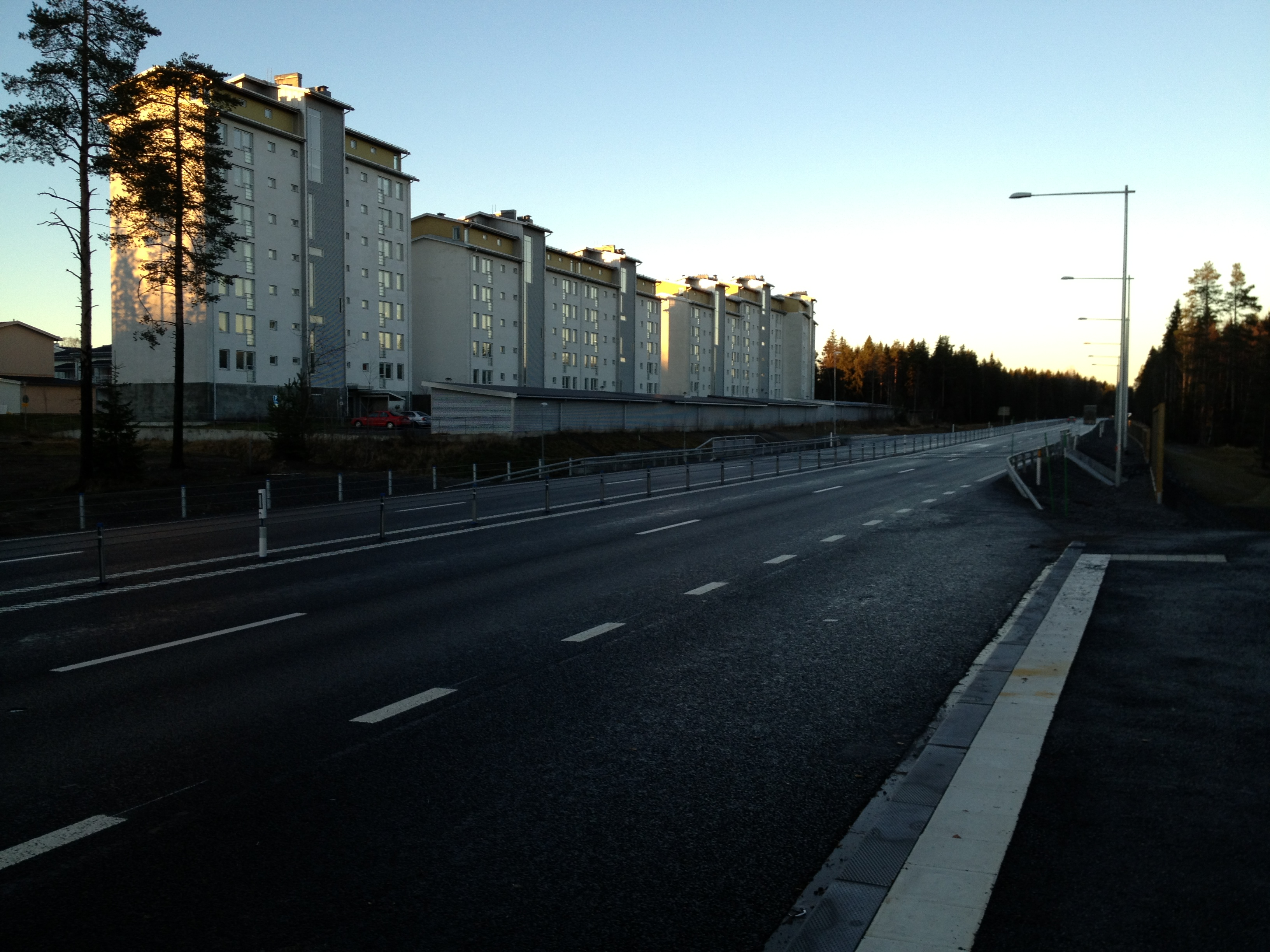 Bilden visar E4 (Kolbäcksvägen) i höjd med Mariestrand. Vy mot norr.